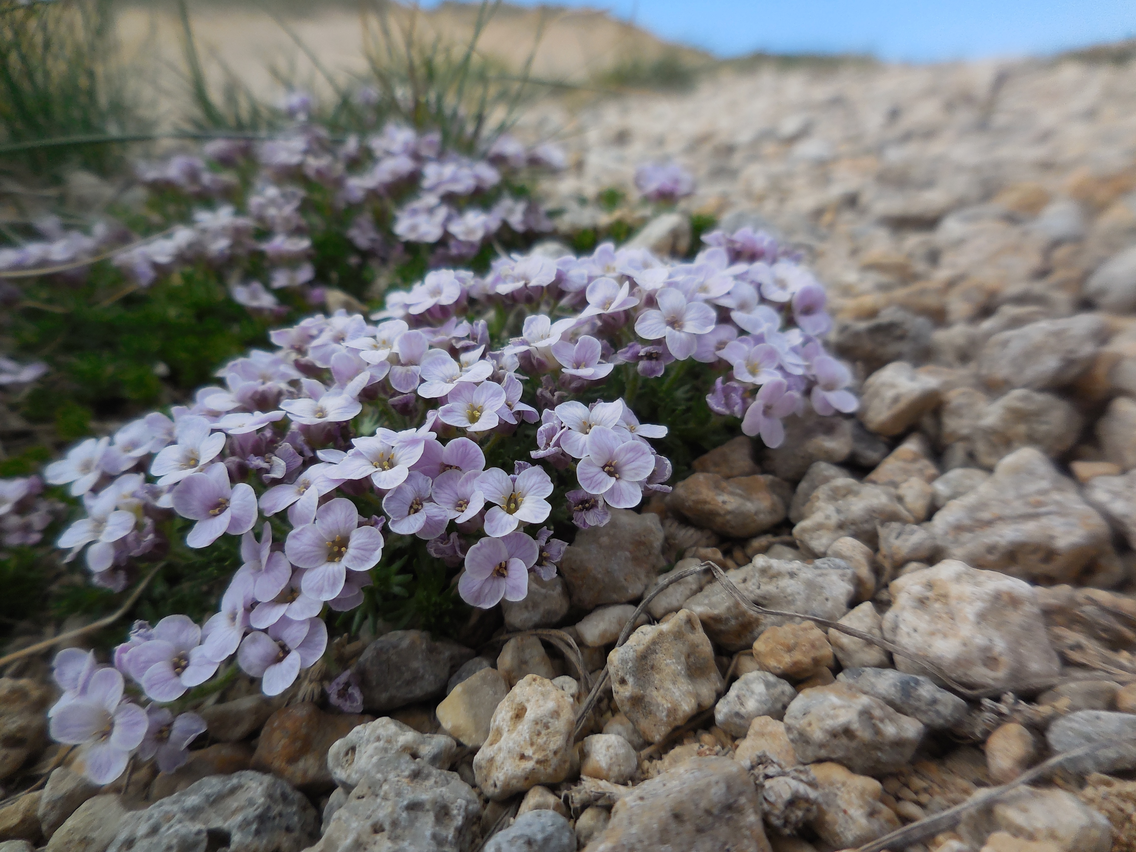 Col d'Izoard - Petrocallis pyrenaica